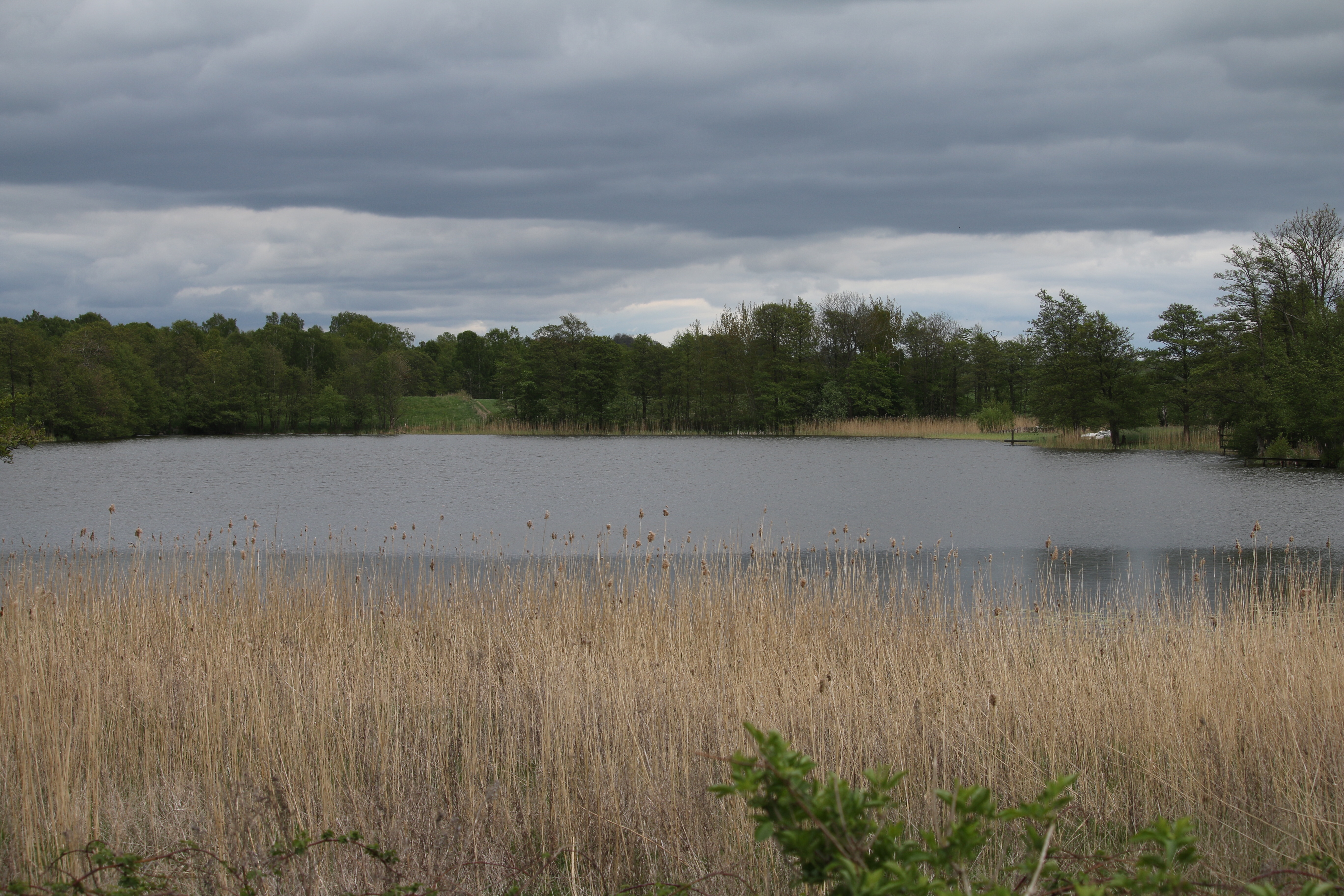 Nötesjön, Skåne